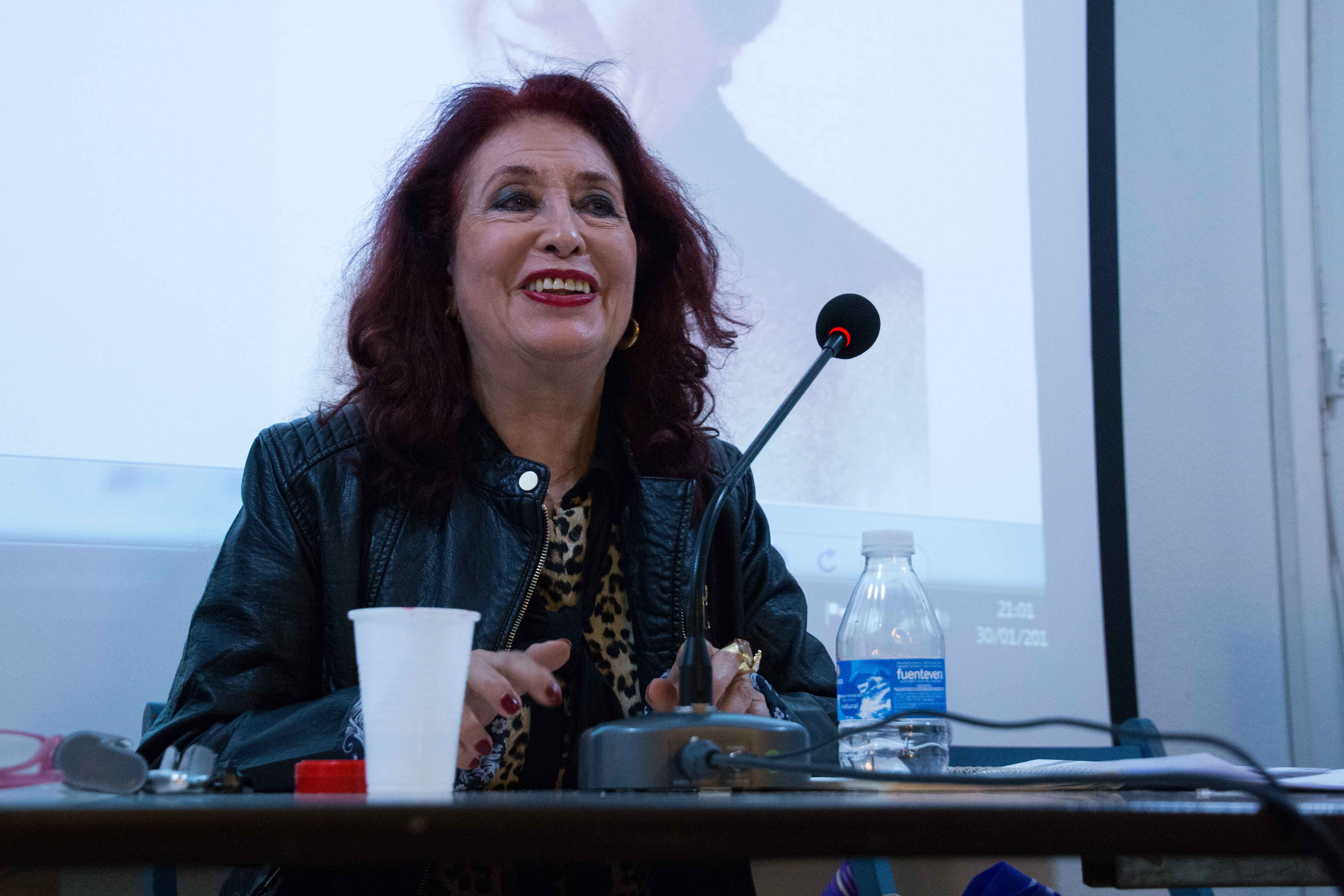 Charla-coloquio con título 'Marximo y feminismo' en el marco del Curso de Feminismo impartido por Lidia Falcón O'Neill (1935- ), presidenta del Partido Feminista de España, durante enero y febrero de 2017